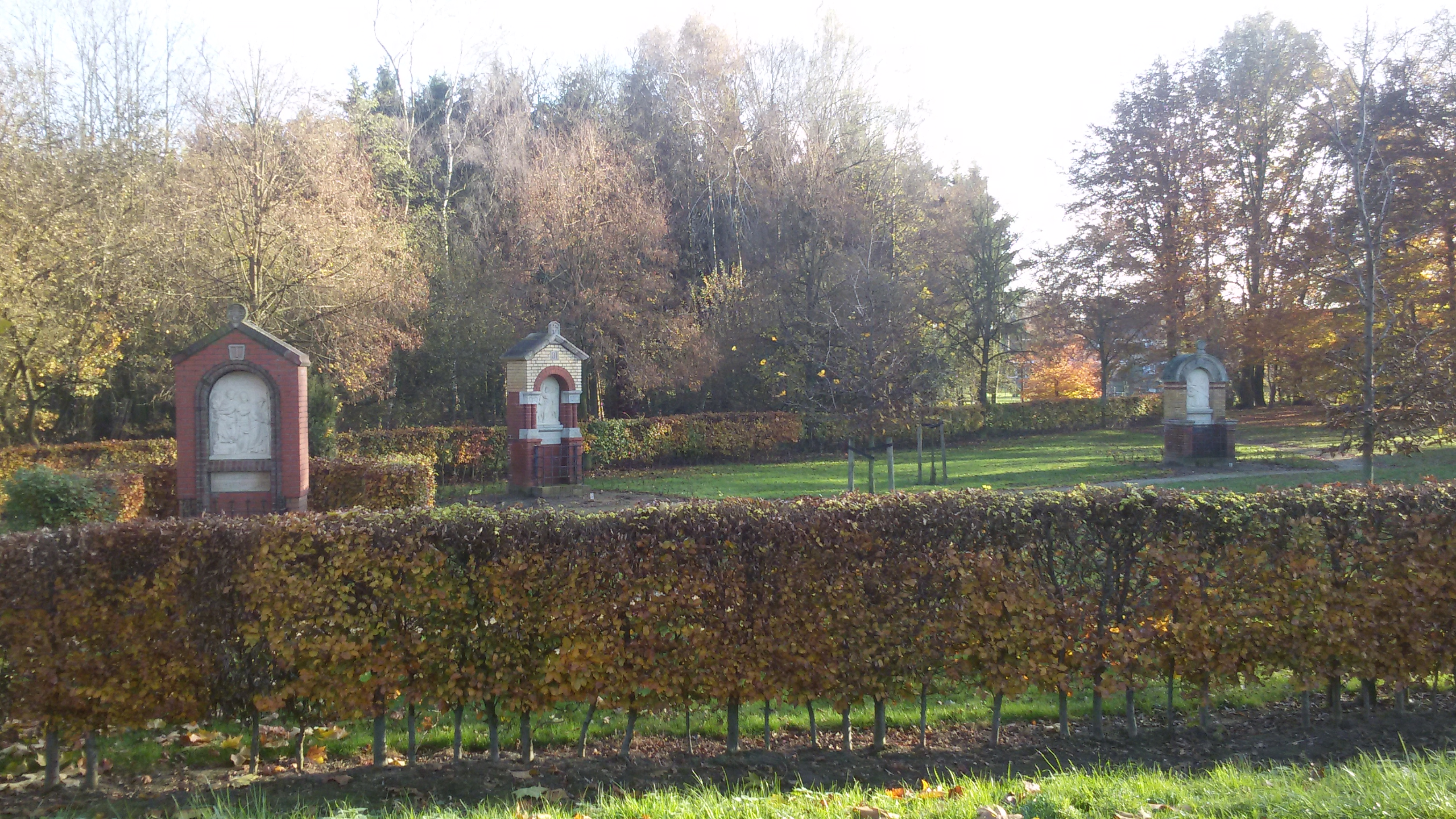 Een detail van het Kruiswegstatiepark in Tienray. Dit park is gelegen aan Over de Beek, achter de Tienrayse kerk.